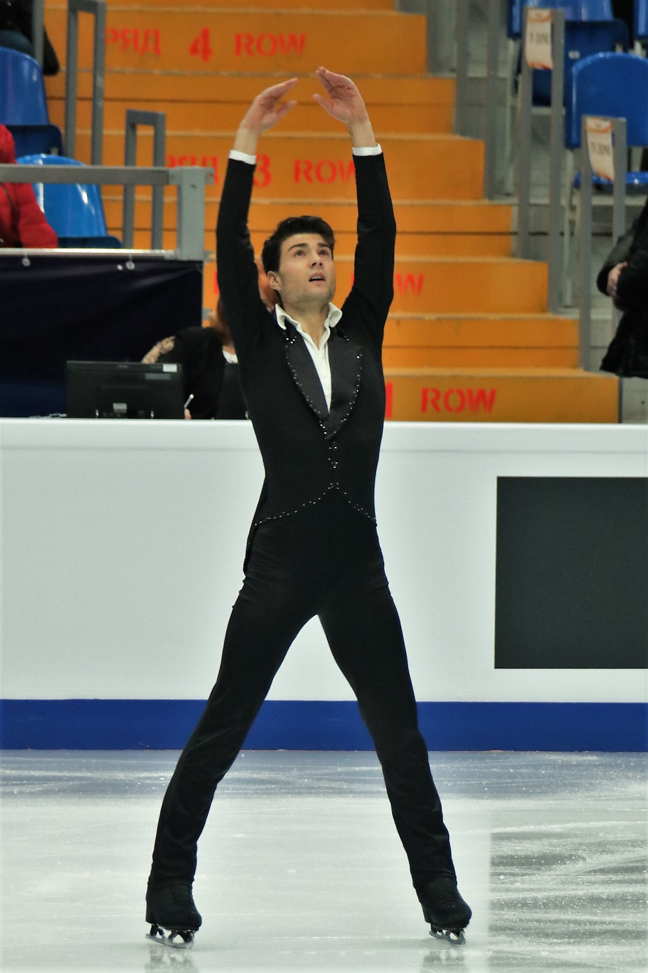 Ромэн Понсар (Франция) на Чемпионате Европы по фигурному катанию 2018.